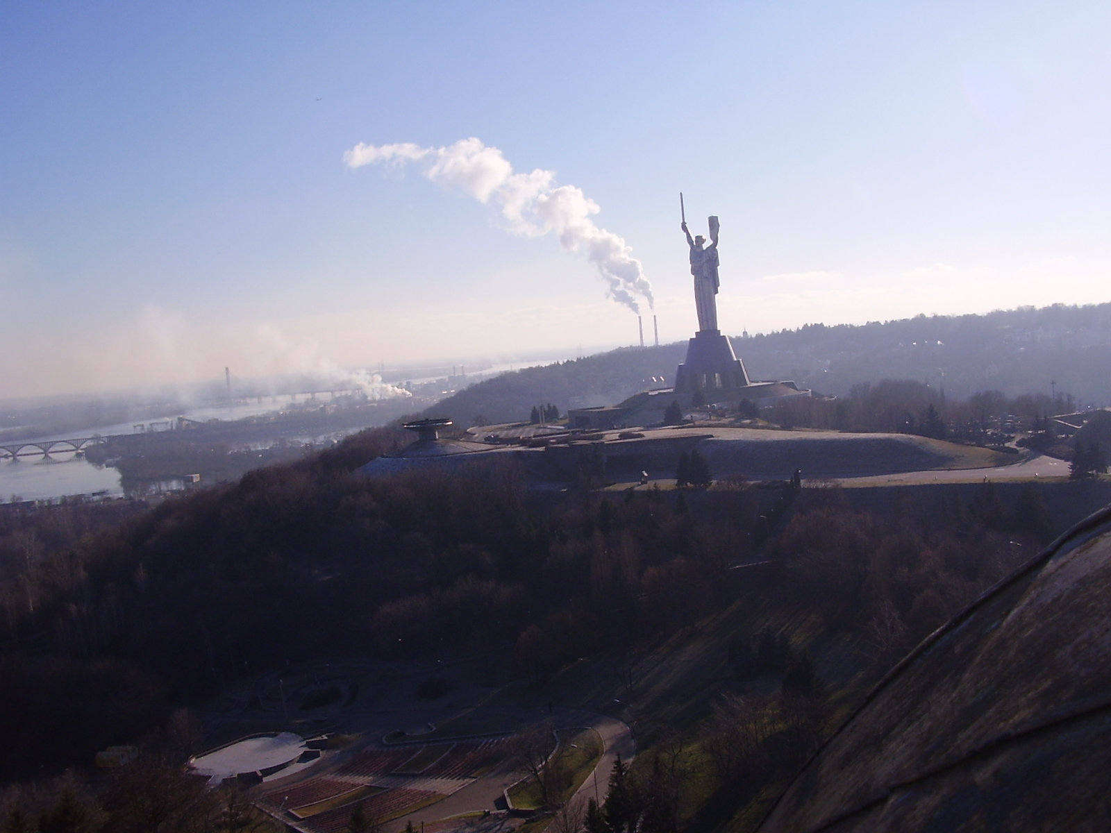 Комплекс Українського державного музею Великої Вітчизняної війни, Київ, Лаврська вул., 35